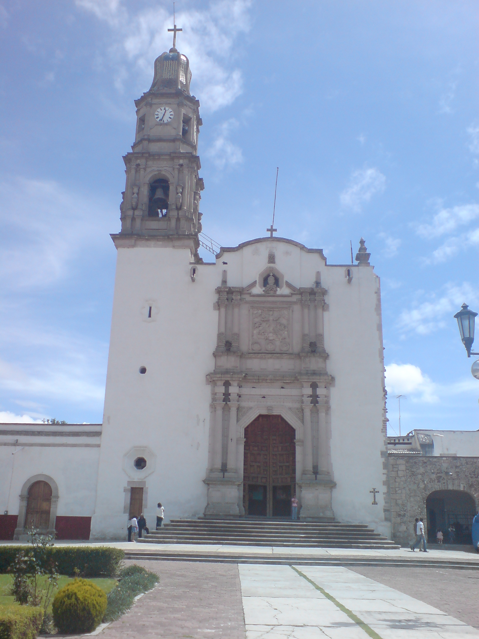 Iglesia del Sagrado Corazón de Jesus y La Asunción de Maria